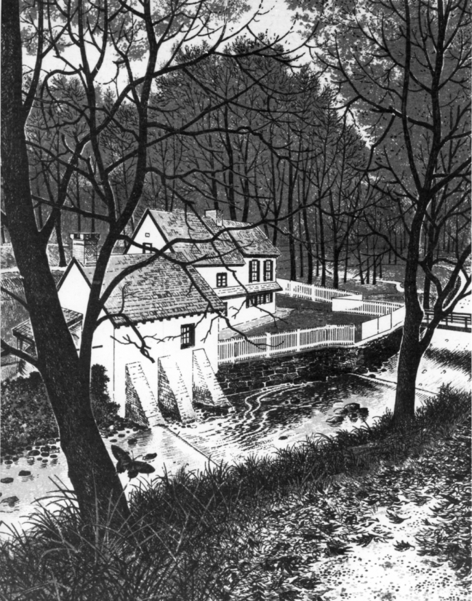 Die Papiermühle der Familie Rettinghaus am Paper Mill Creek